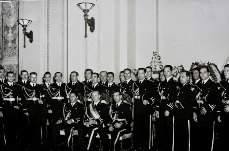 Plana mayor de Jacobo Arbenz